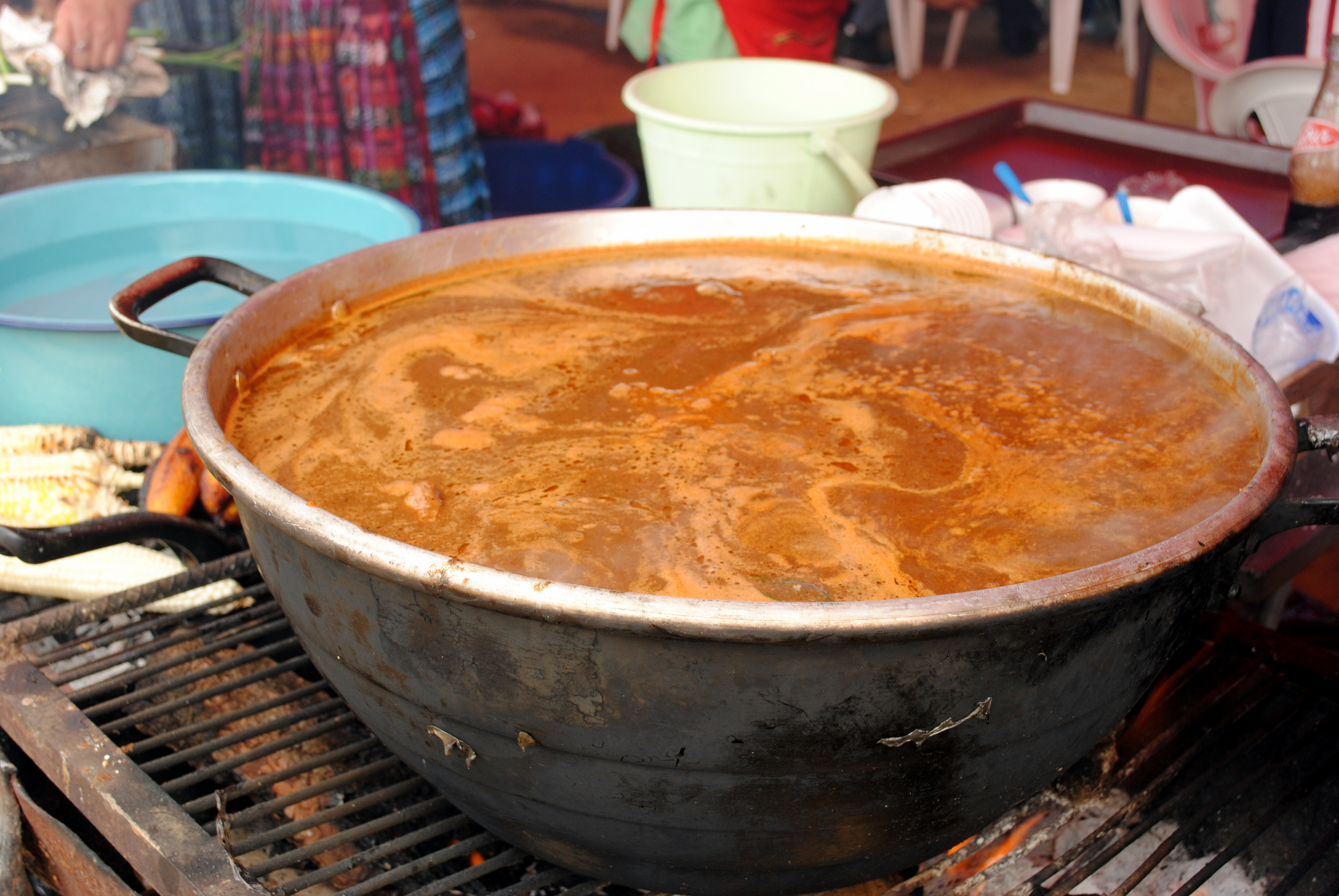 Olla de pepián, aún en el fuego, pero ya listo para ser servido